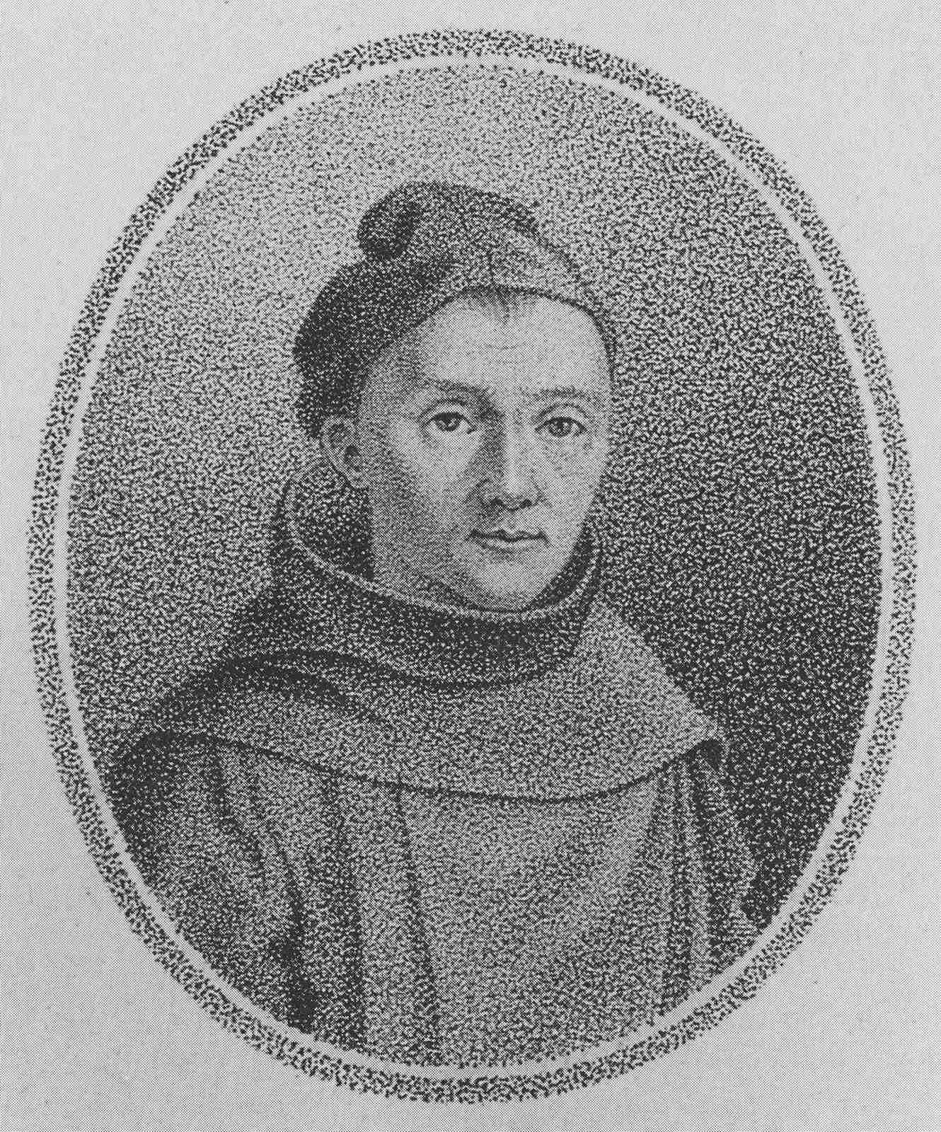 David Ruetschmann - Frater a Sancto Cajetano (1726-1796); Punktierstich von Putz